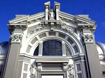 Church Messina Chiesa del Carmine